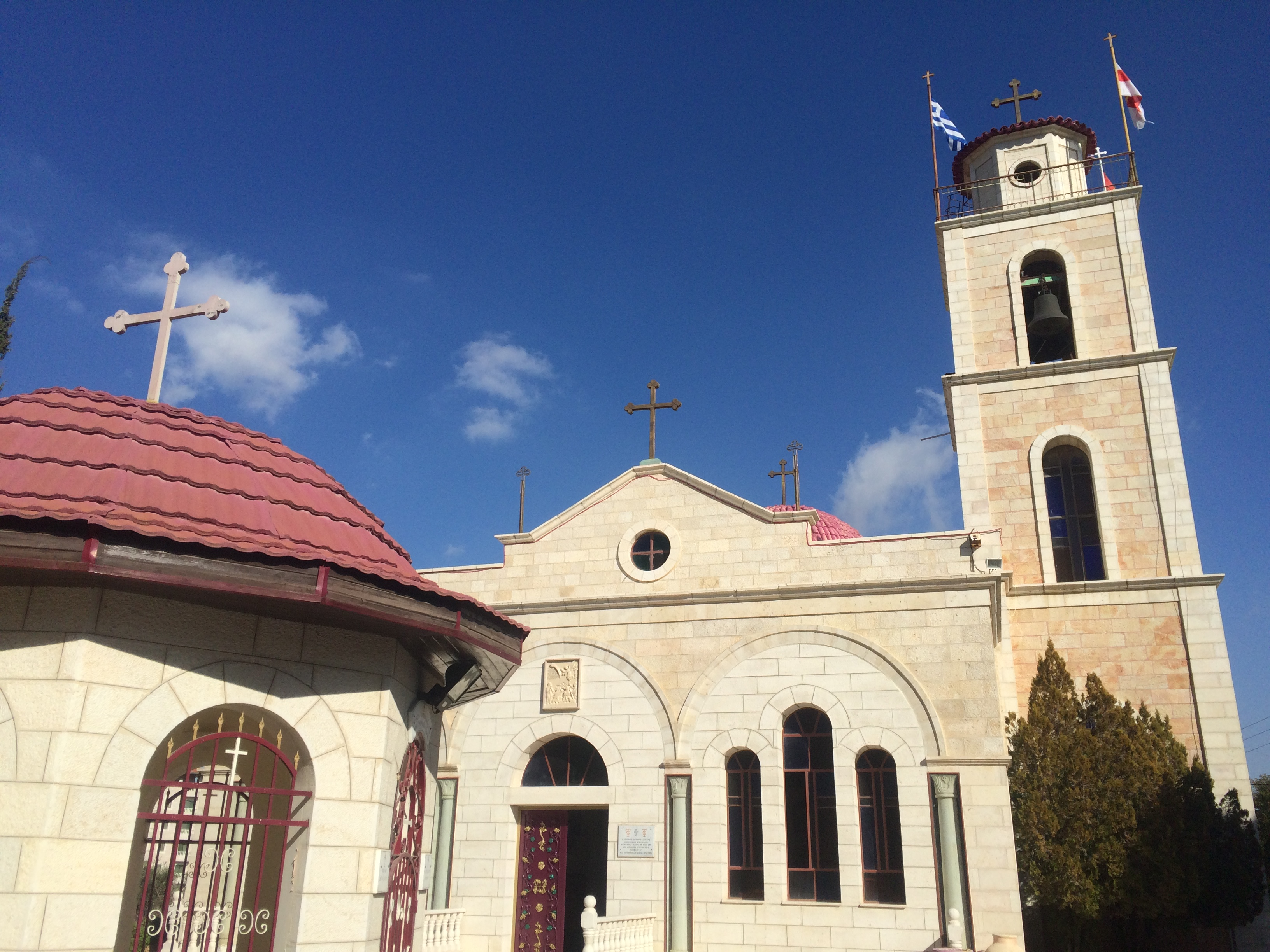 Греческий православный храм монастыря в поле Пастушков. Бейт-Сахур